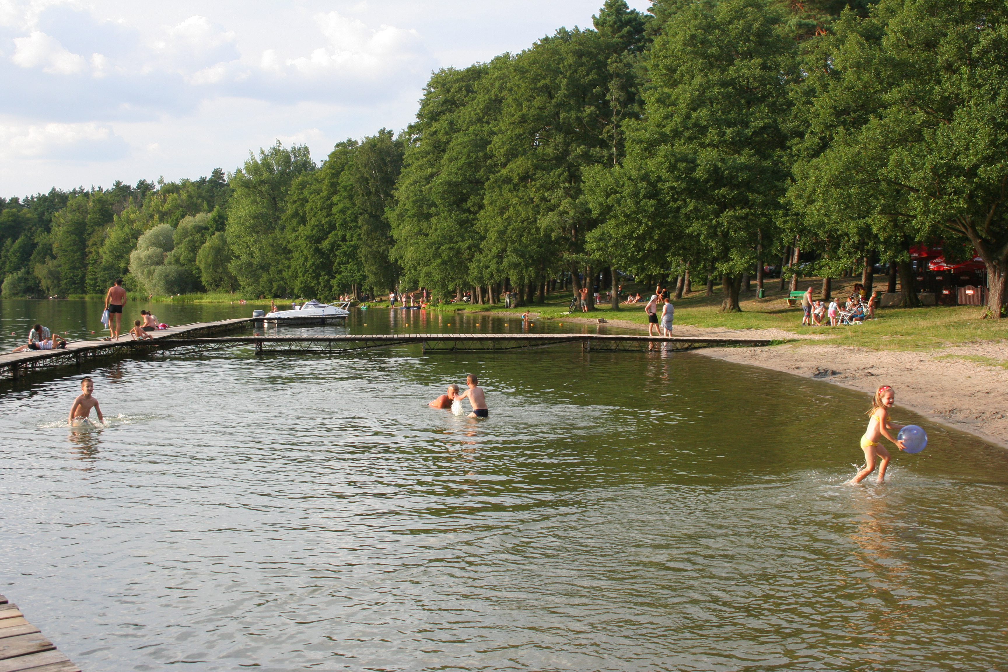 Jezioro Sarcz w Trzciance.